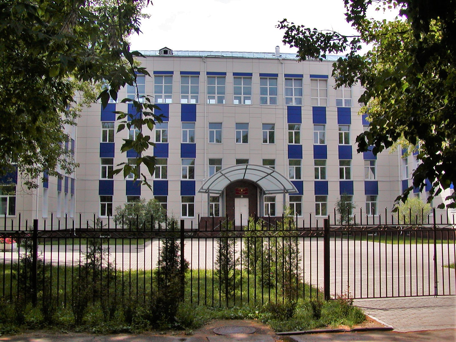 Общий вид обнинской Гимназии с главным входом.